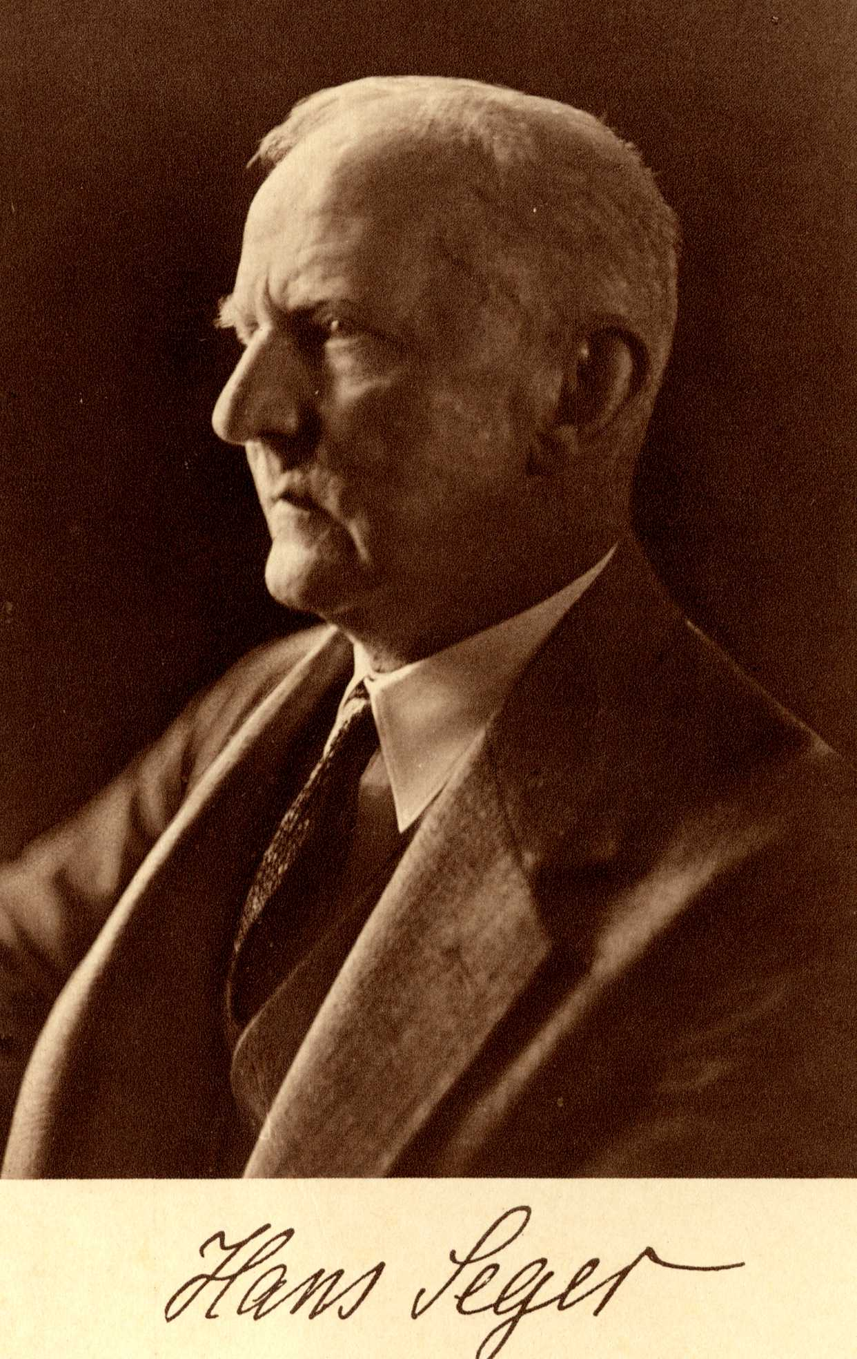 Portrait Hans Seger (1864–1943)